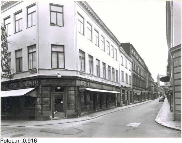 Drottninggatan 24 - Korsgatan 6, Göteborg. Foto från år 1959. Fotograf Stig Sjöstedt. Göteborgs stadsmuseums bildsamling.